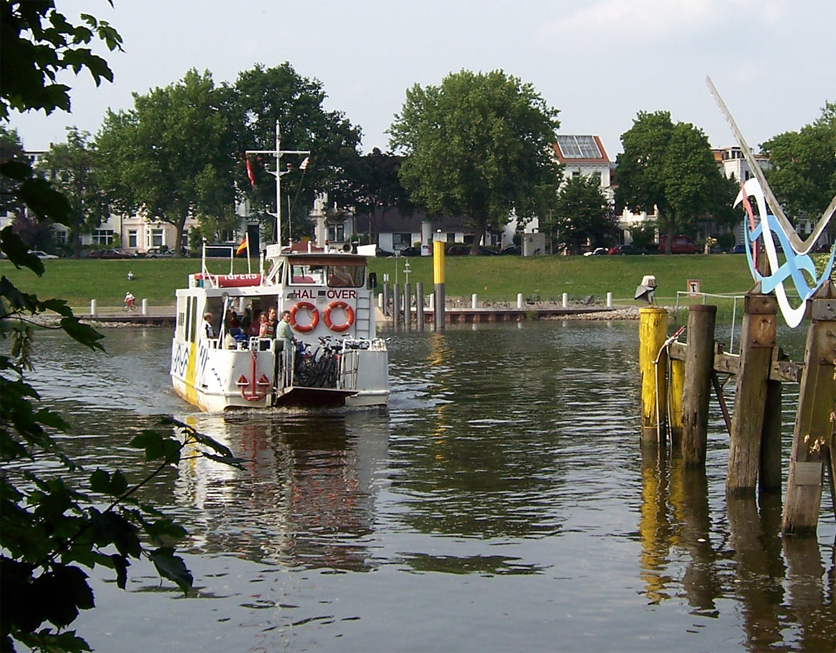 Sielwallfähre Ostertor der Hal över Schreiber Reederei vor dem Anleger Café Sand an der Weser in Bremen. The "Ostertor" is 12.83 m. long and 4.32 m. wide.